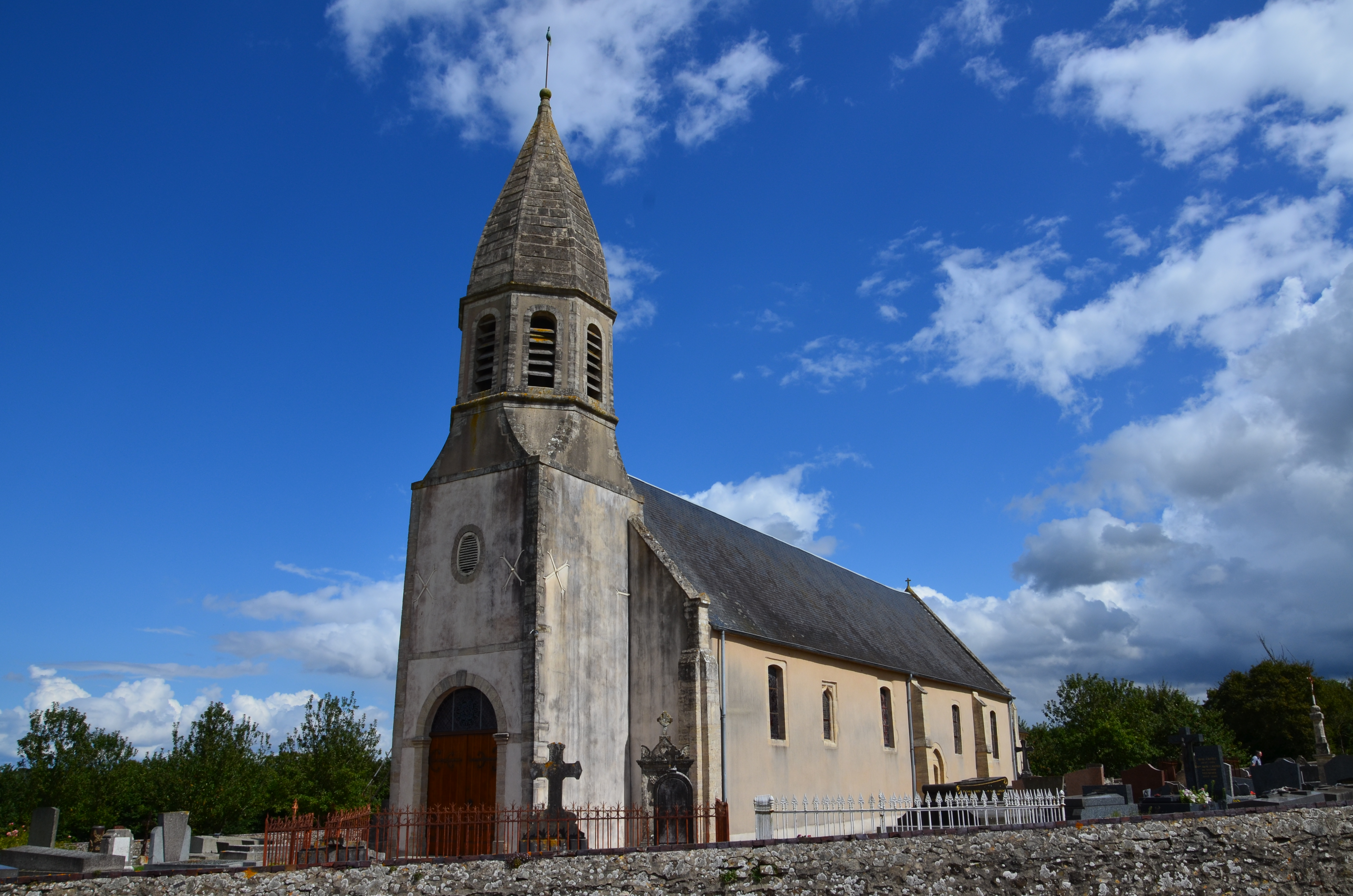 Église Saint-Germain de Noron-la-Poterie.